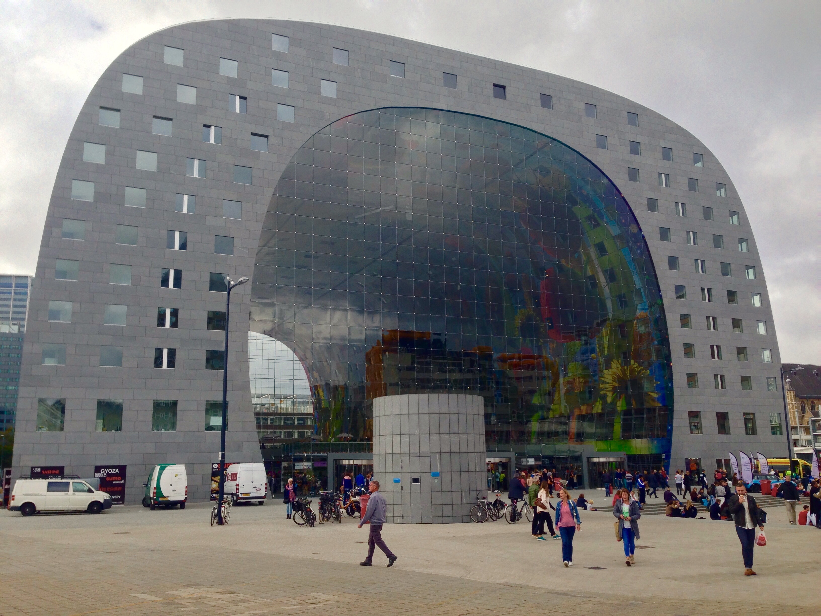 vooraanzicht van de Markthal in Rotterdam op 17 oktober 2014